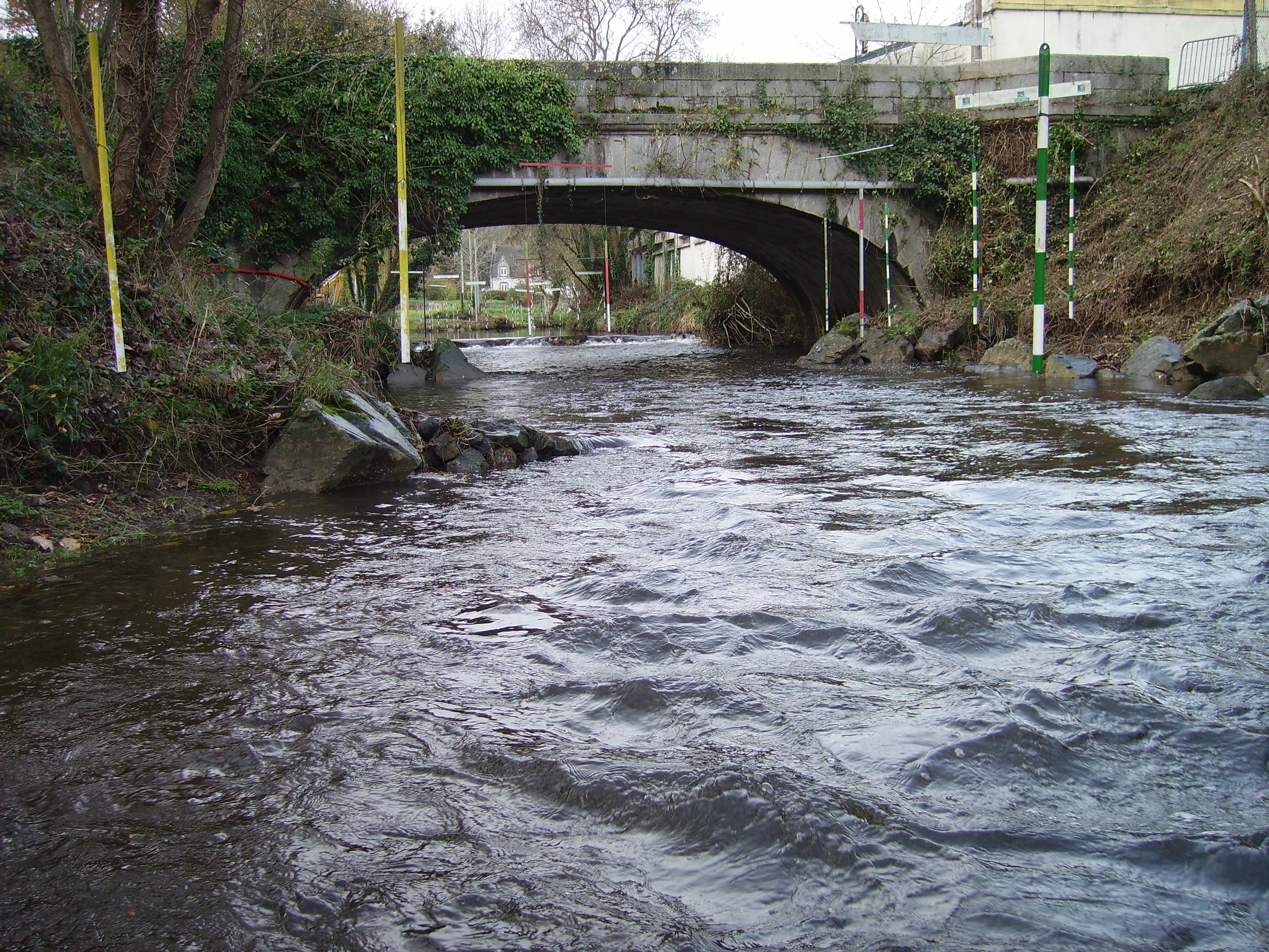 Ponto super la rivereto Gouët en San-Briego (la pendantaj stangoj estas indikiloj por kanuado)